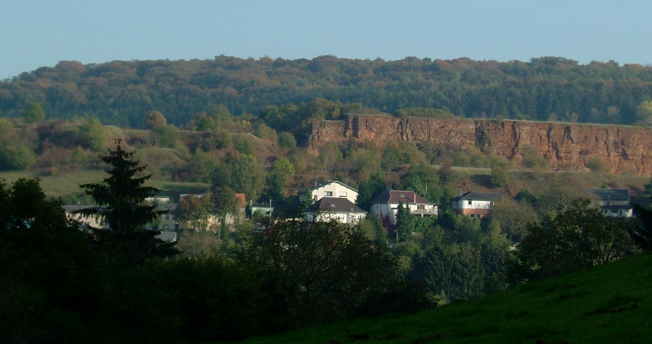 Hesselsbierg an der Gemeng Keel